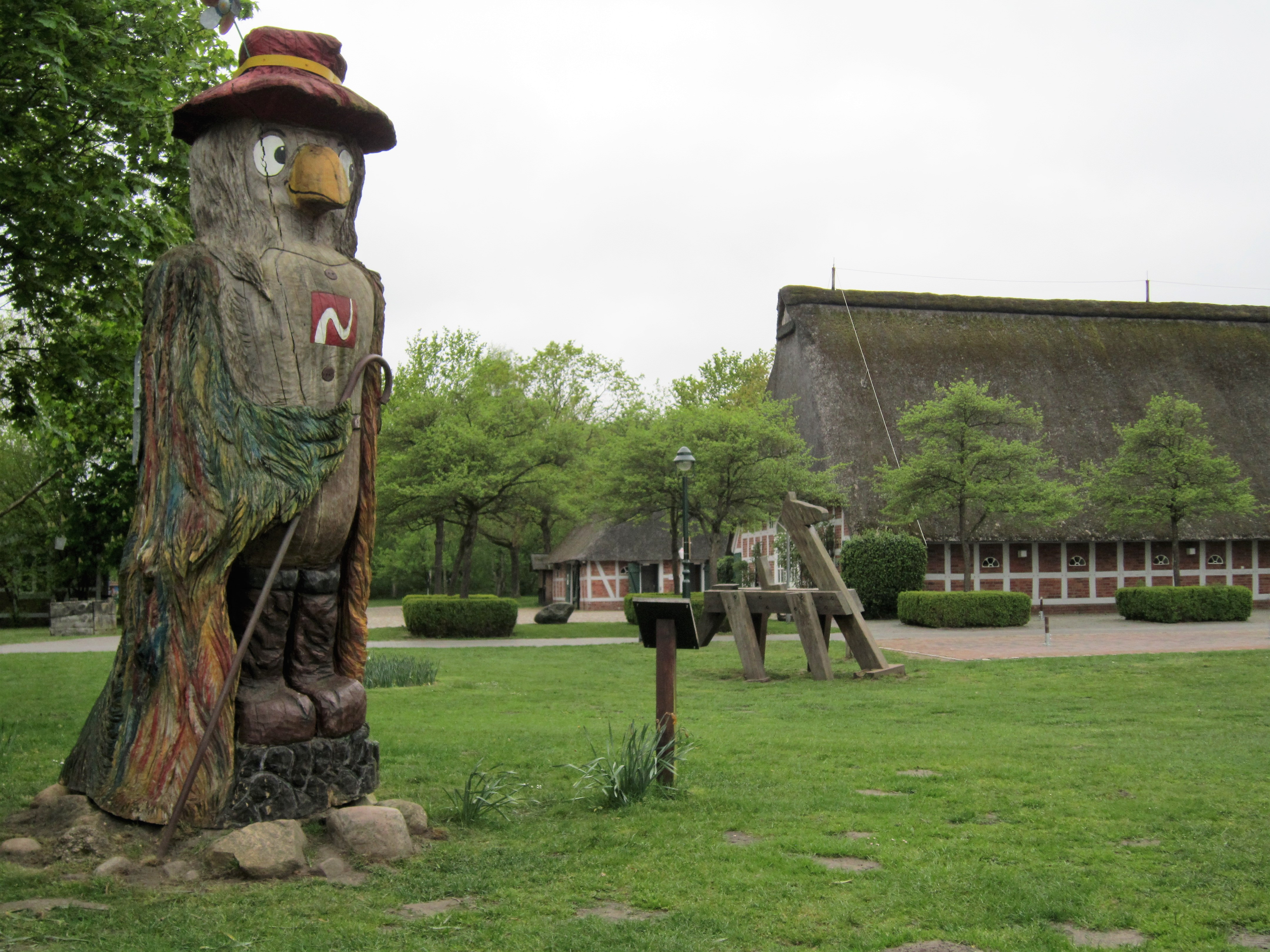 Die Holzskulptur "Willie Wandervogel" wurde 2015 auf einer Wiese zwischen dem "Haus am See" und dem Vörder See im Natur- und Erlebnispark Bremervörde aufgestellt.